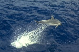 Tursiops truncatus che salta fuori dall'acqua